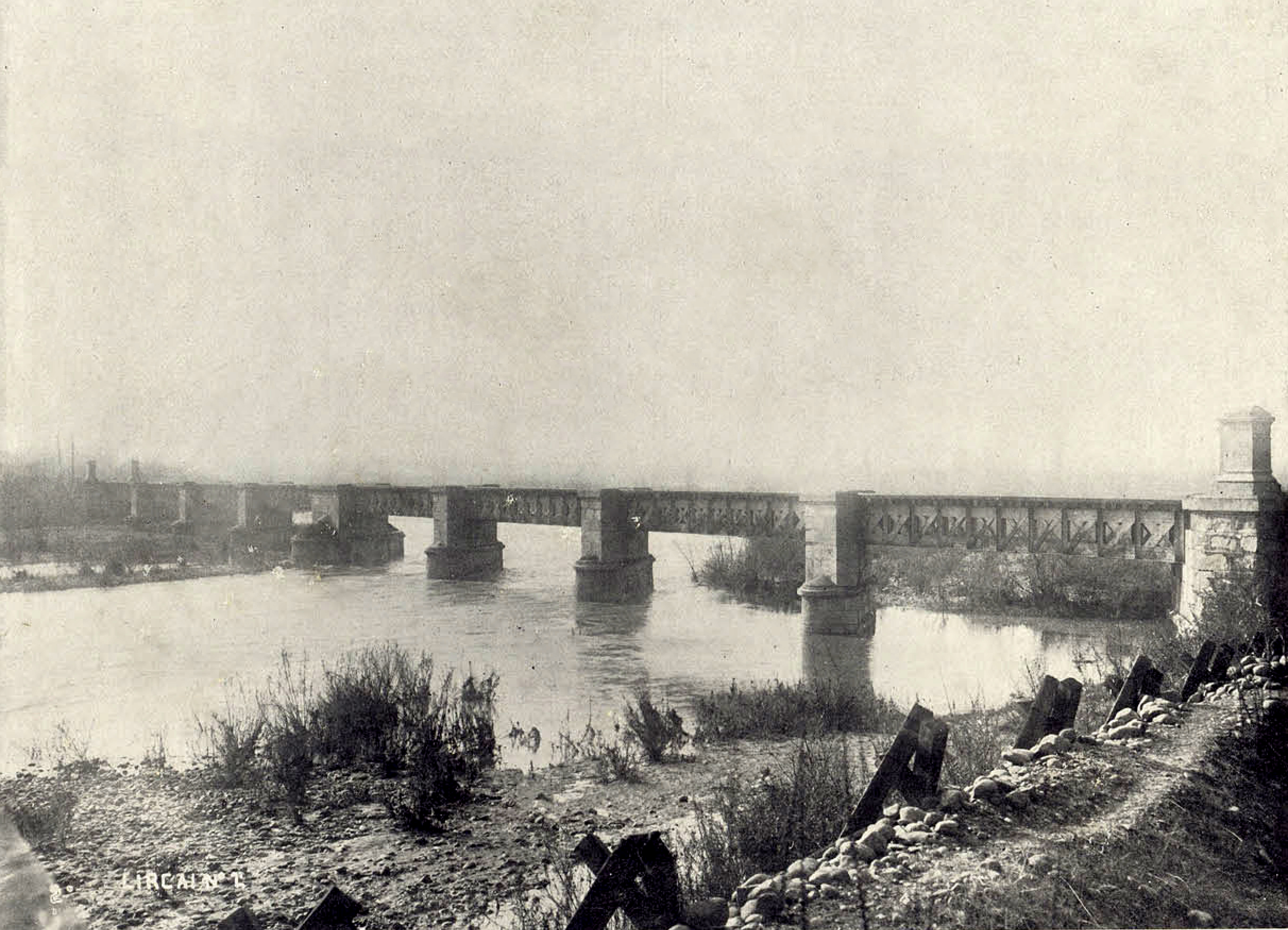 Fotografía ca. 1900 del puente ferroviario n° 1 sobre el río Lircay, proyectado por Domingo V. Santa María y construido por Lever, Murphy y Cía, en 1885.